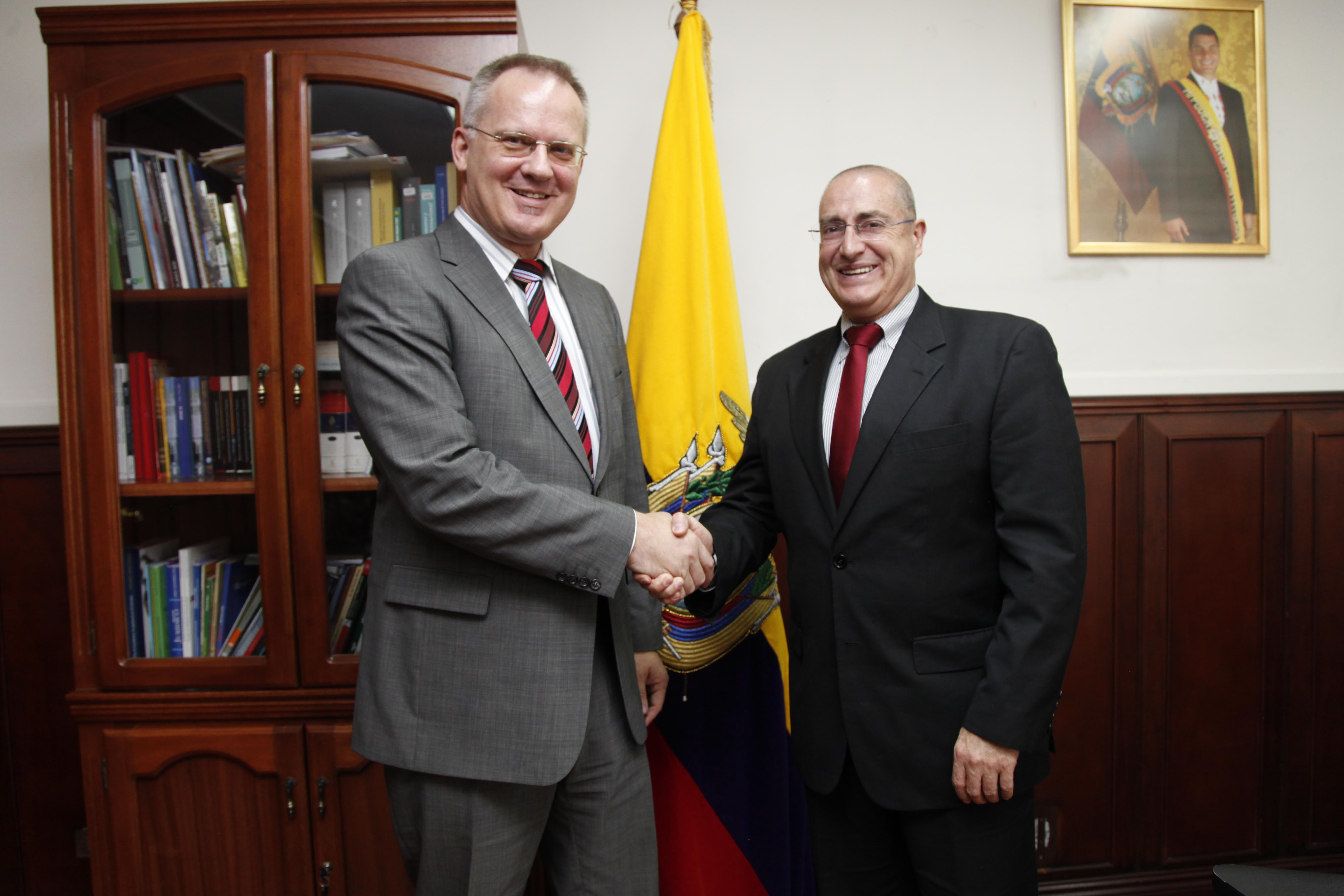 Quito (Ecuador), 28 de Noviembre 2013. El vicecanciller Marco Albuja recibió en su despacho al Embajador de Austria Andres Melan. Foto: Xavier Granja Cedeño - Cancillería del Ecuador.